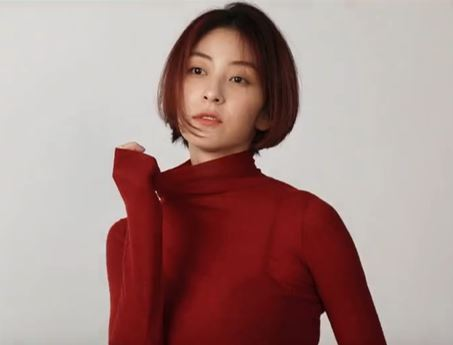 화이트, 블랙, 레드. 세 가지 컬러를 입은 왕지원의 '우먼센스' 화보 촬영 현장을 공개합니다. 자세한 이야기는 '우먼센스' 10월호에서 확인하세요.